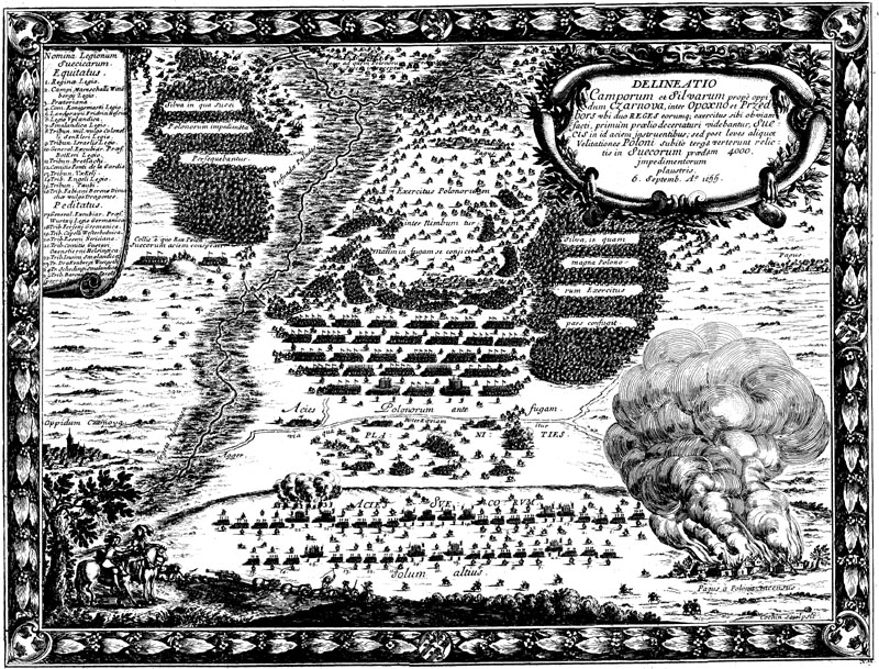 Bitwa pod Żarnowem 1655